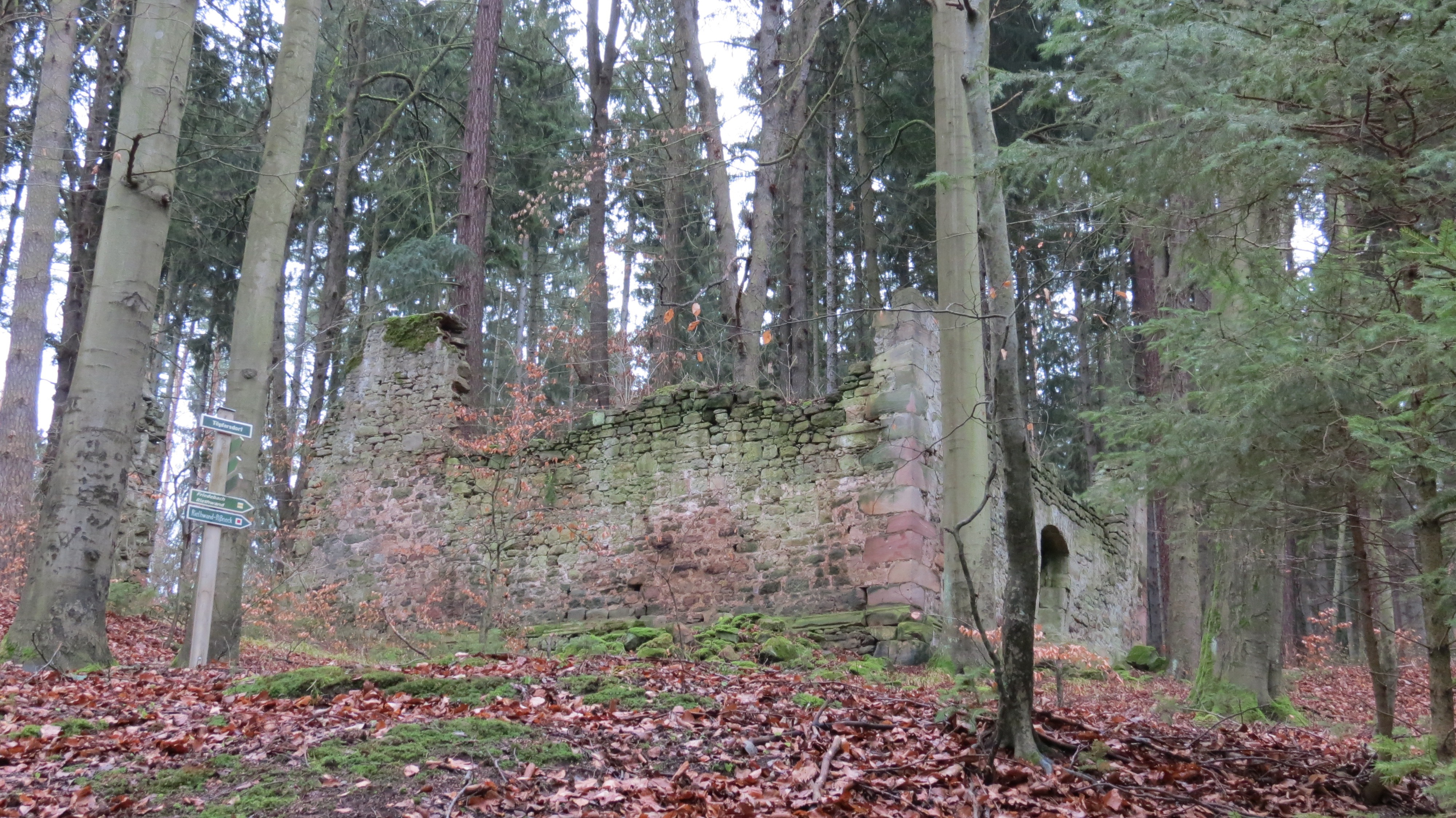 Im Winter